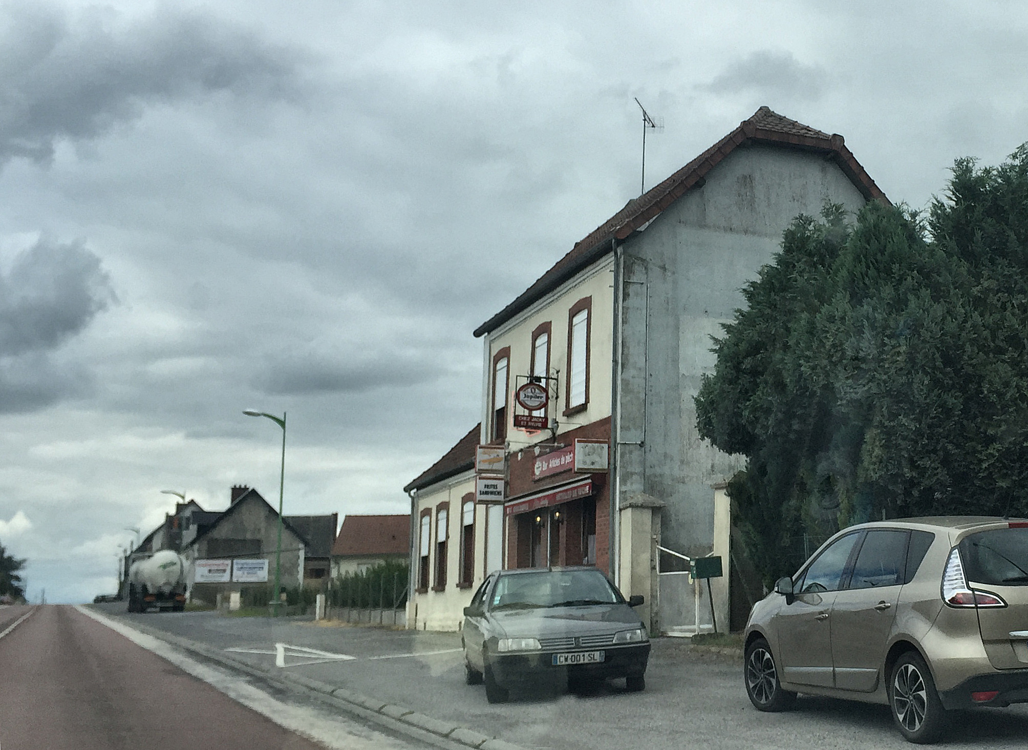 Een restaurant aan de voormalige Route Nationale 17 in Frankrijk